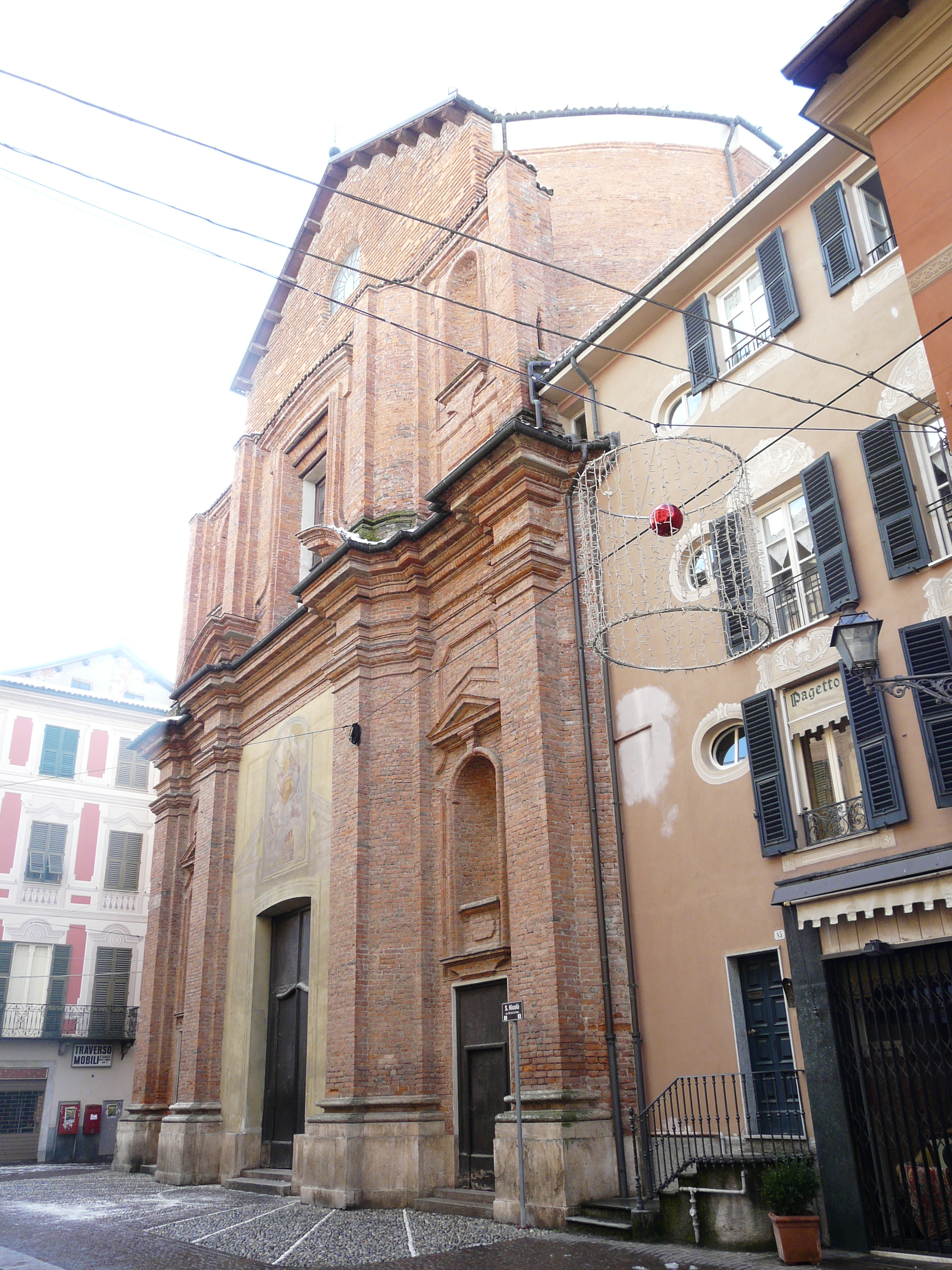 Chiesa di San Nicolò, Novi Ligure, Piemonte, Italia